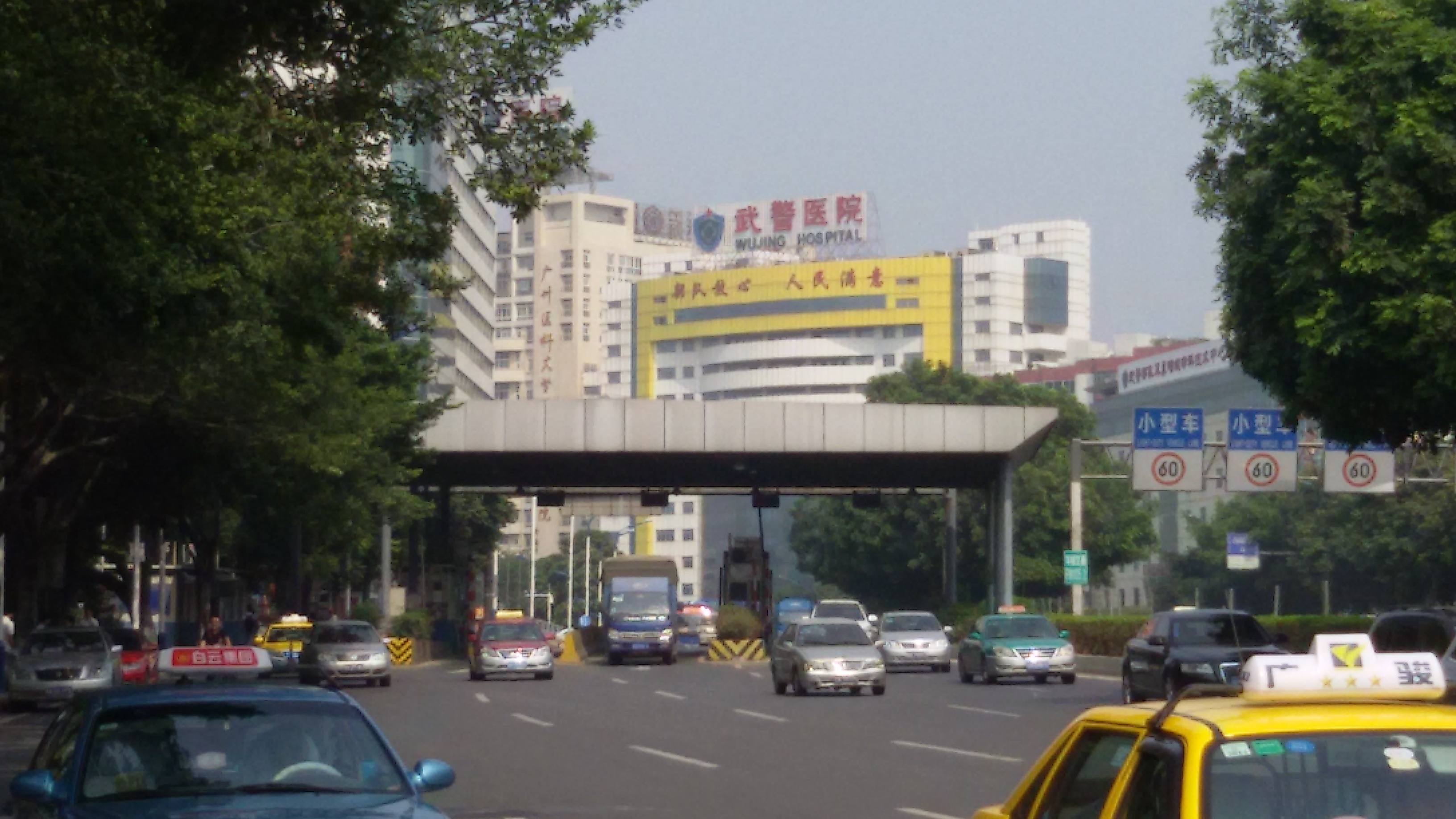 粵語: 武警廣東省總隊醫院